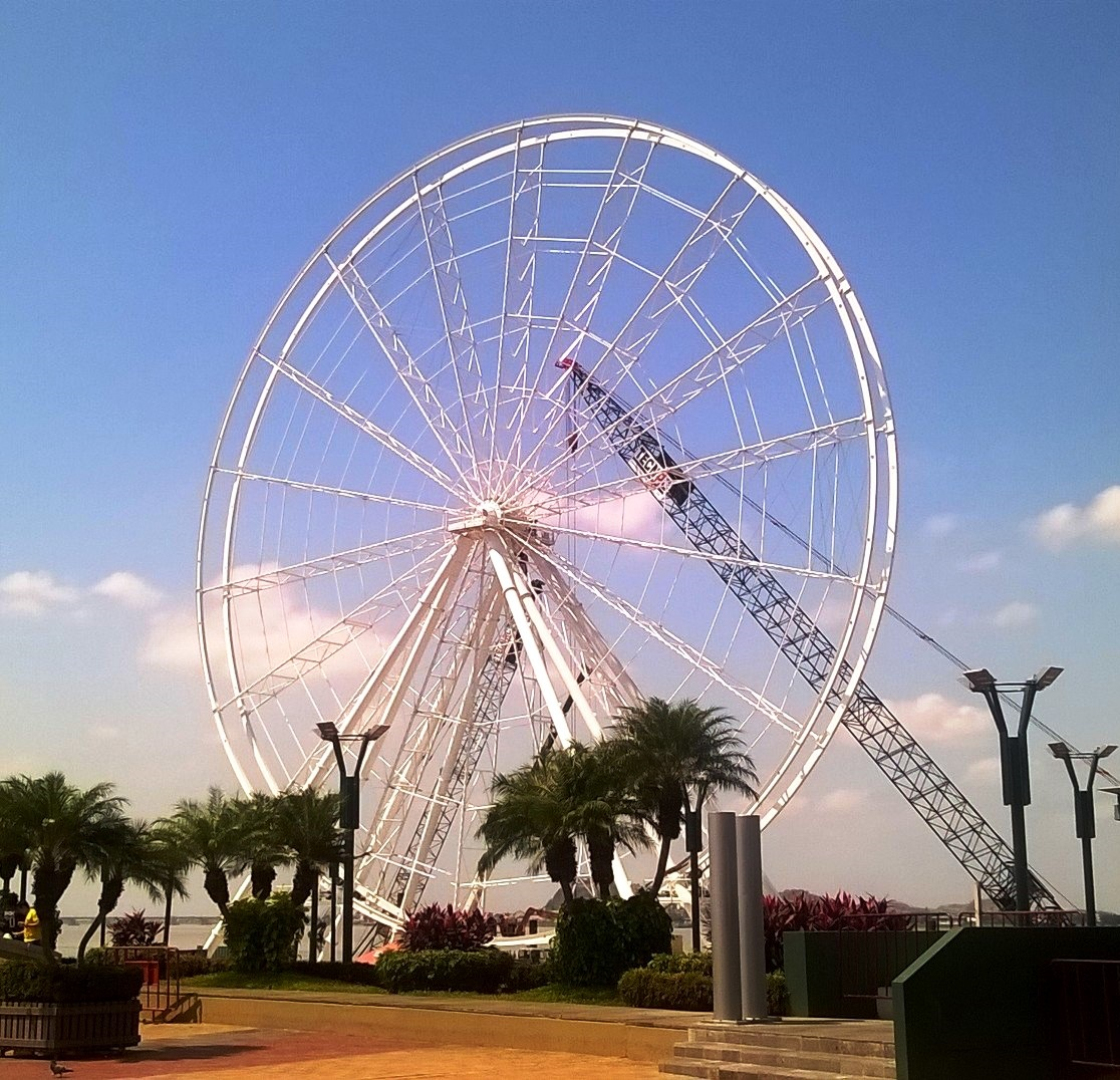 Guayaquil, 1 de agosto de 2016.- La Perla: Vista de la noria-mirador de 57 metros de altura que operará en el Malecón 2000 de la ciudad de Guayaquil.